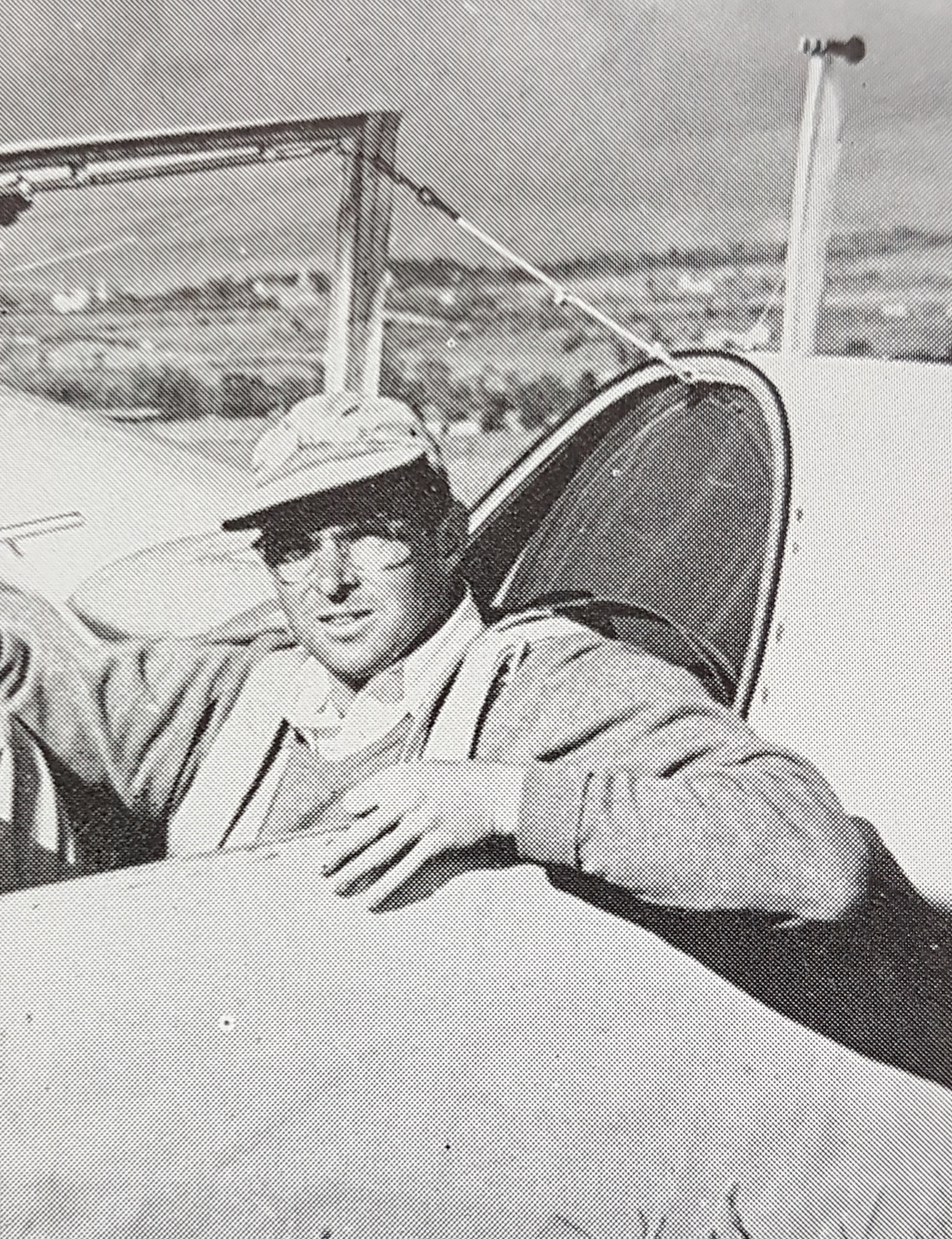 Paul MacCready